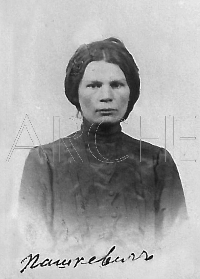 Алаіза Пашкевіч-Кайрыс (1876–1916), адна з лідарак беларускага нацыянальнага асяродку ў Вільні падчас кайзераўскай акупацыі ў 1915–1916 гг. З фондаў БДАМЛМ